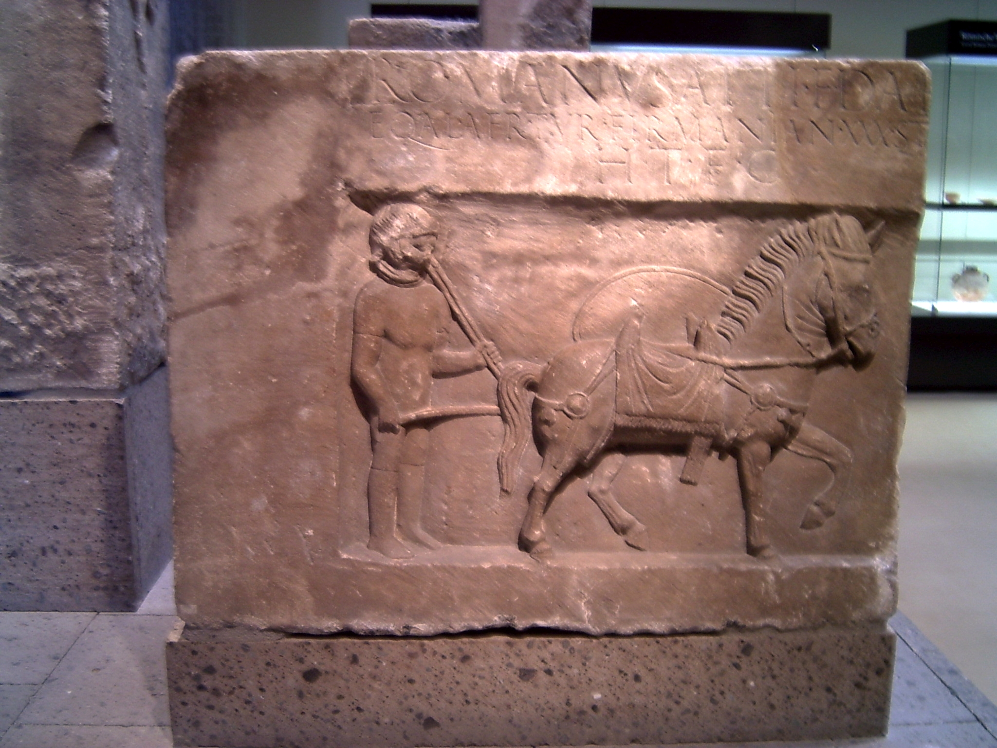 CIL XIII 8305. For other images, see gallery Römisch-Germanisches Museum.